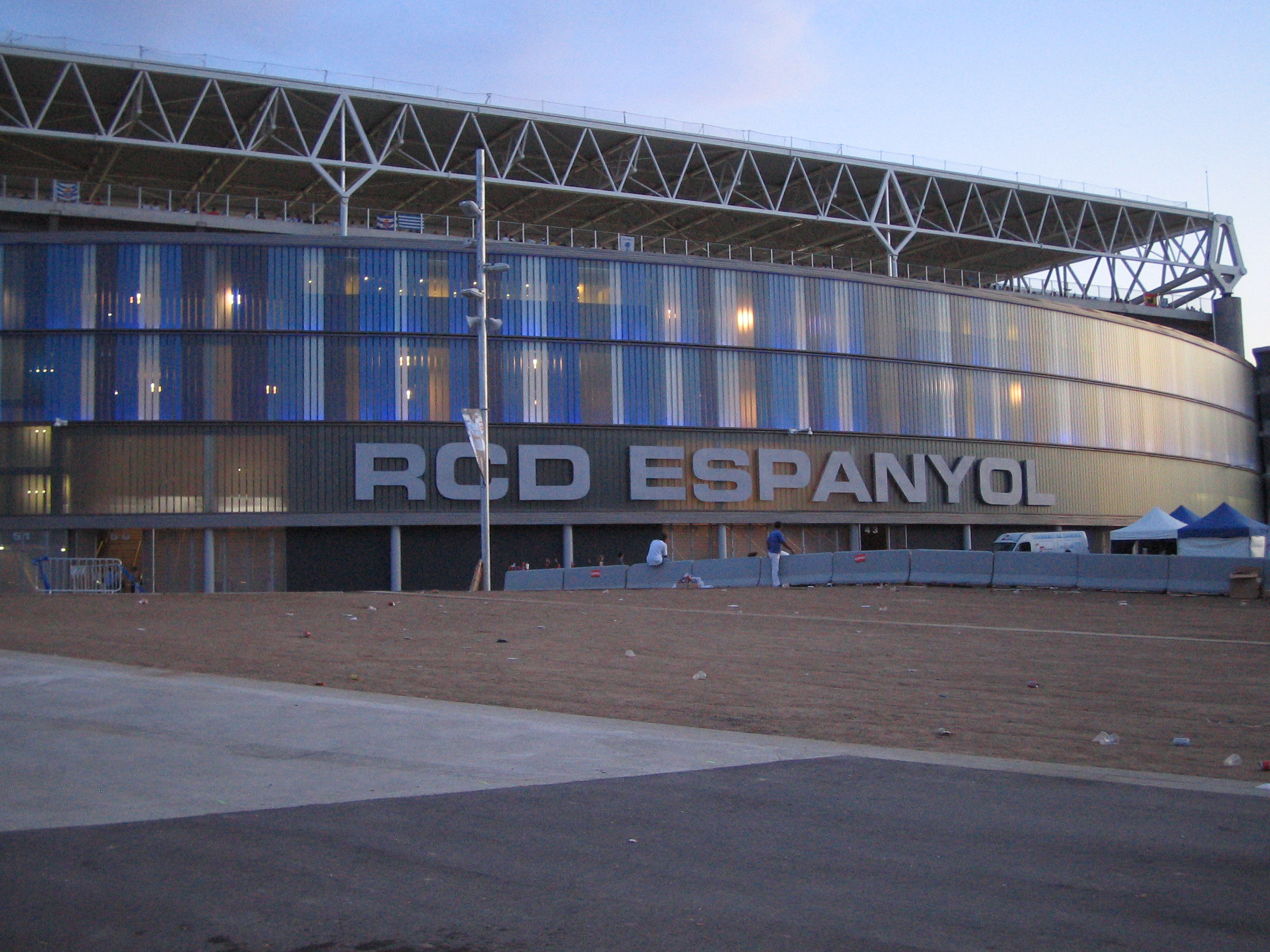 L'estadi de l'Espanyol el dia de la inauguració